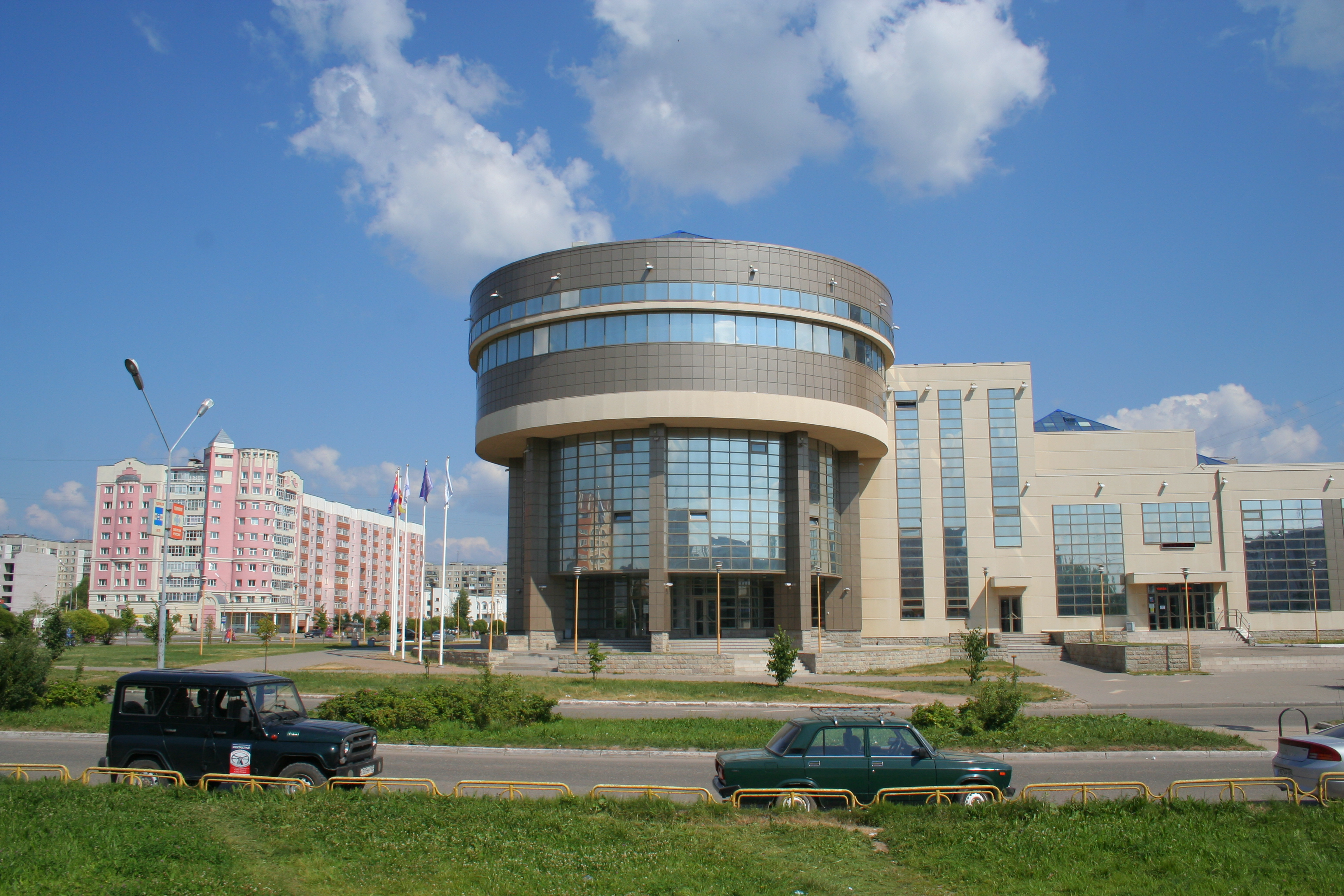 Stadt Udomlja (Oblast Twer, Russland). Zentraler Platz der Stadt; rechts das Zentrum für öffentliche Information des Kernkraftwerkes Kalinin.